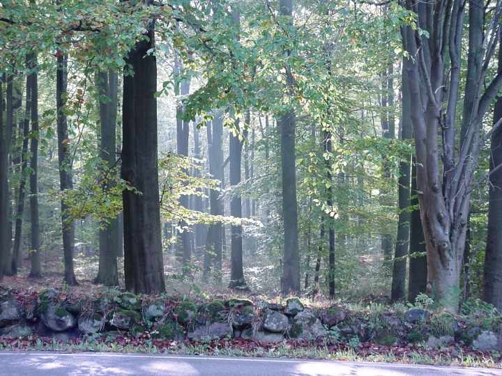 Hareskoven. Fægyden.